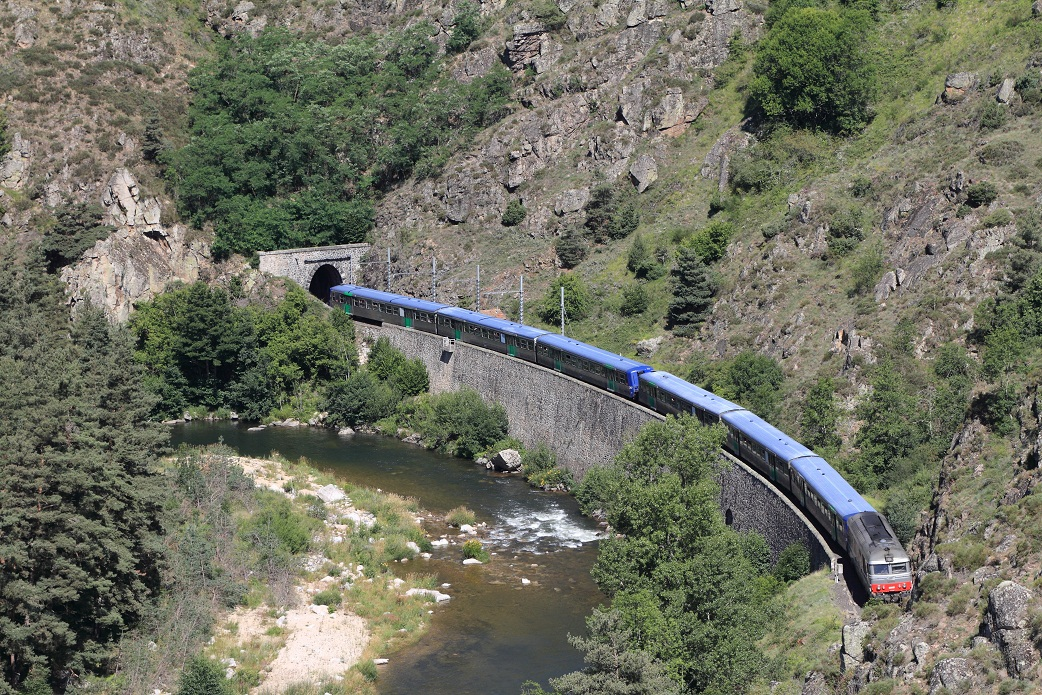 Train touristique des gorges de l'Allier entrant dans le tunnel de Génestouze, en direction de Langeac (NB : locomotive en pousse, rame réversible) au PK 573,500 de la ligne des Cévennes en août 2011, Auvergne, France.